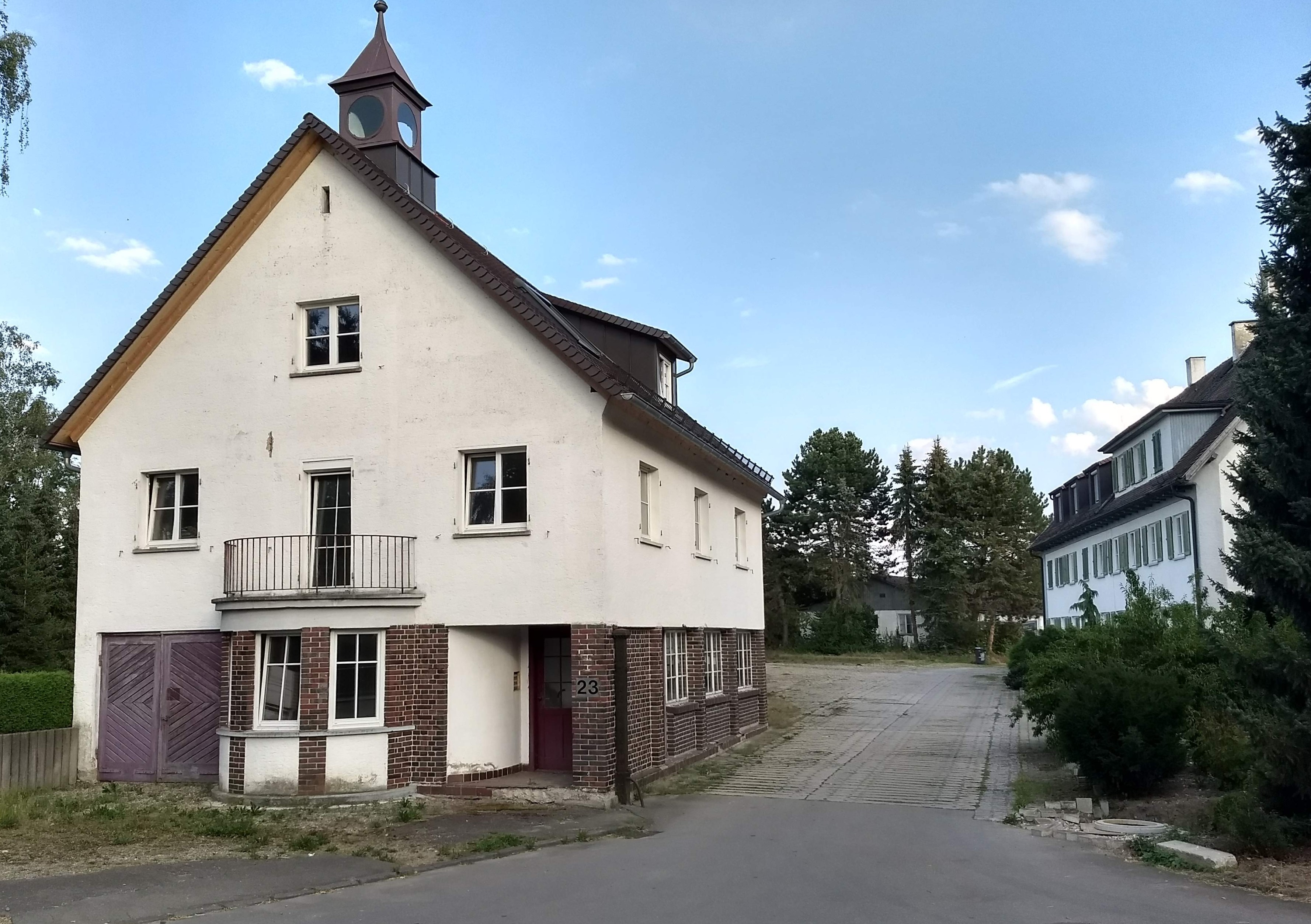 ehemaliges Werksgelände des Steiger Automobilherstellers